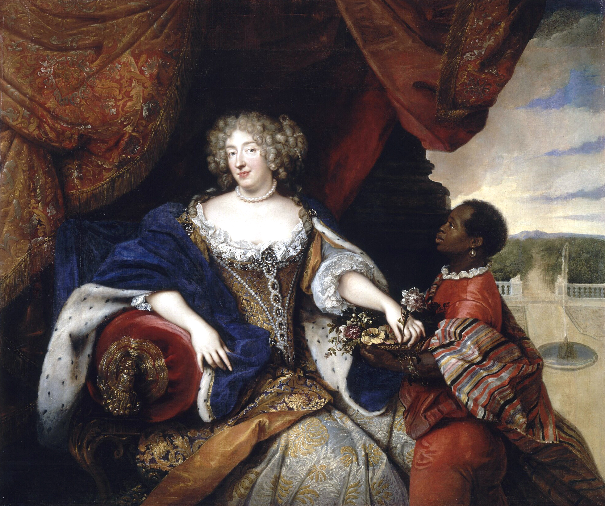 Porträt Lieselottes von der Pfalz mit einem Mohr